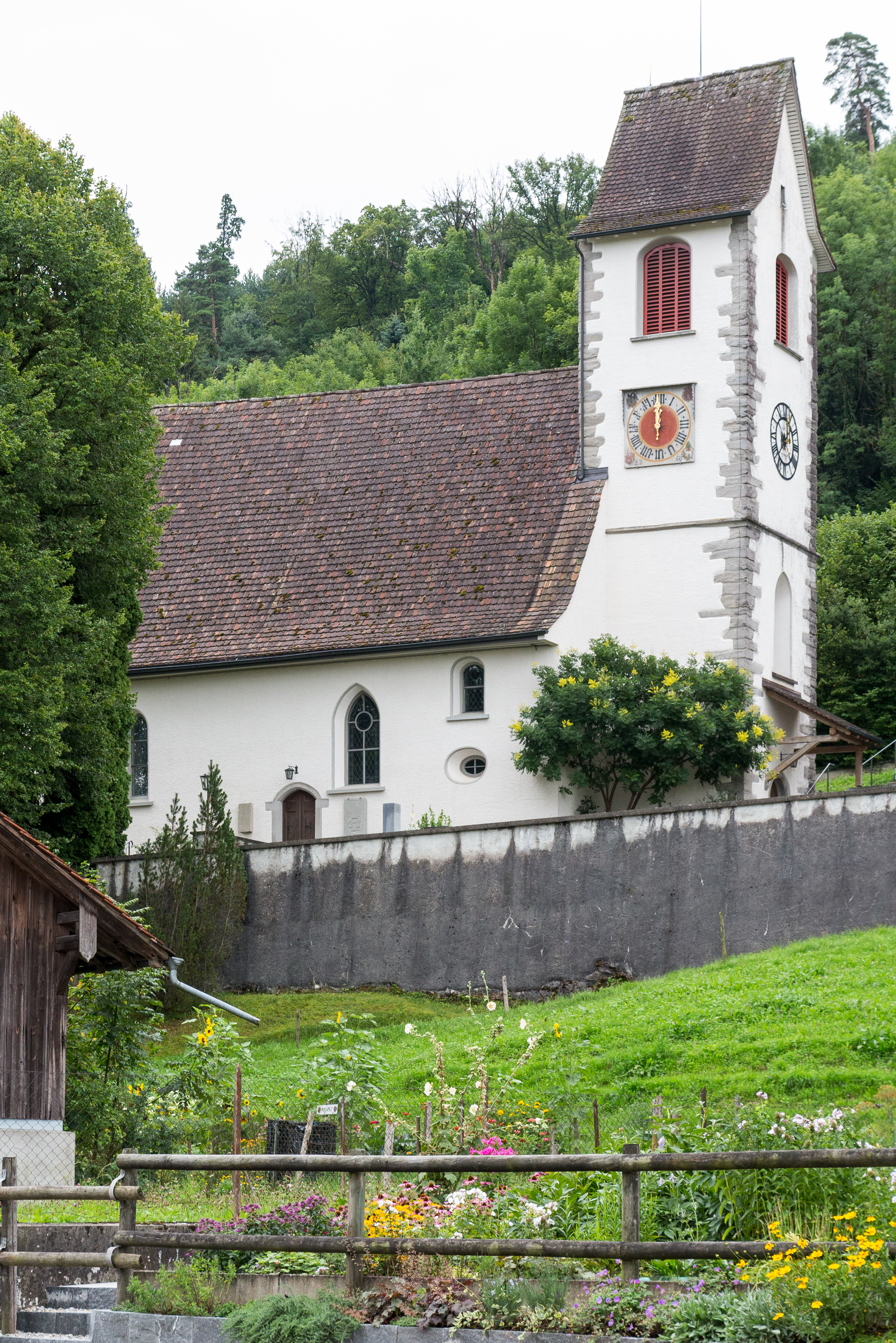 Reformierte Kirche St. Andreas